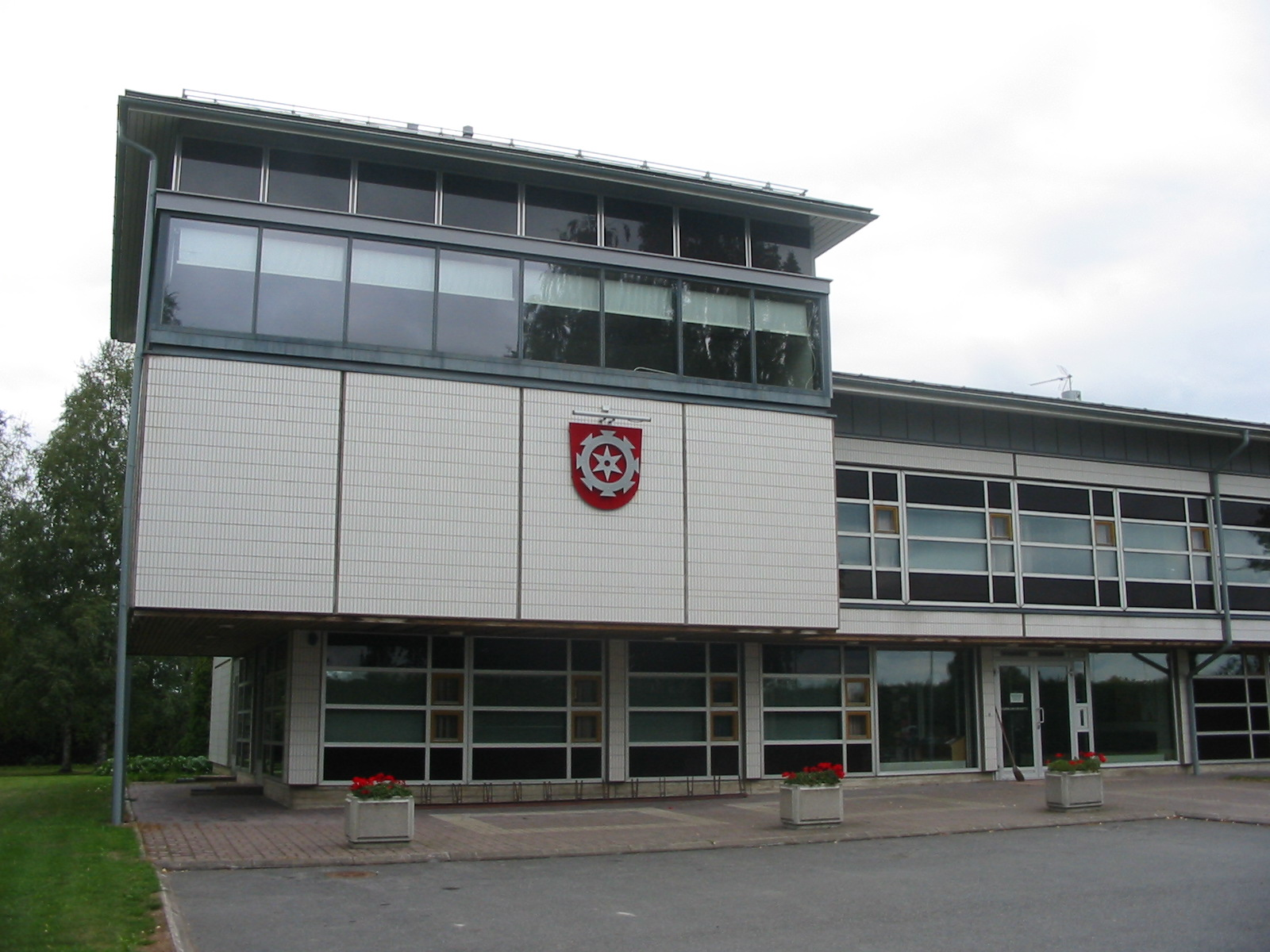 Kosken Tl Kunnantalo